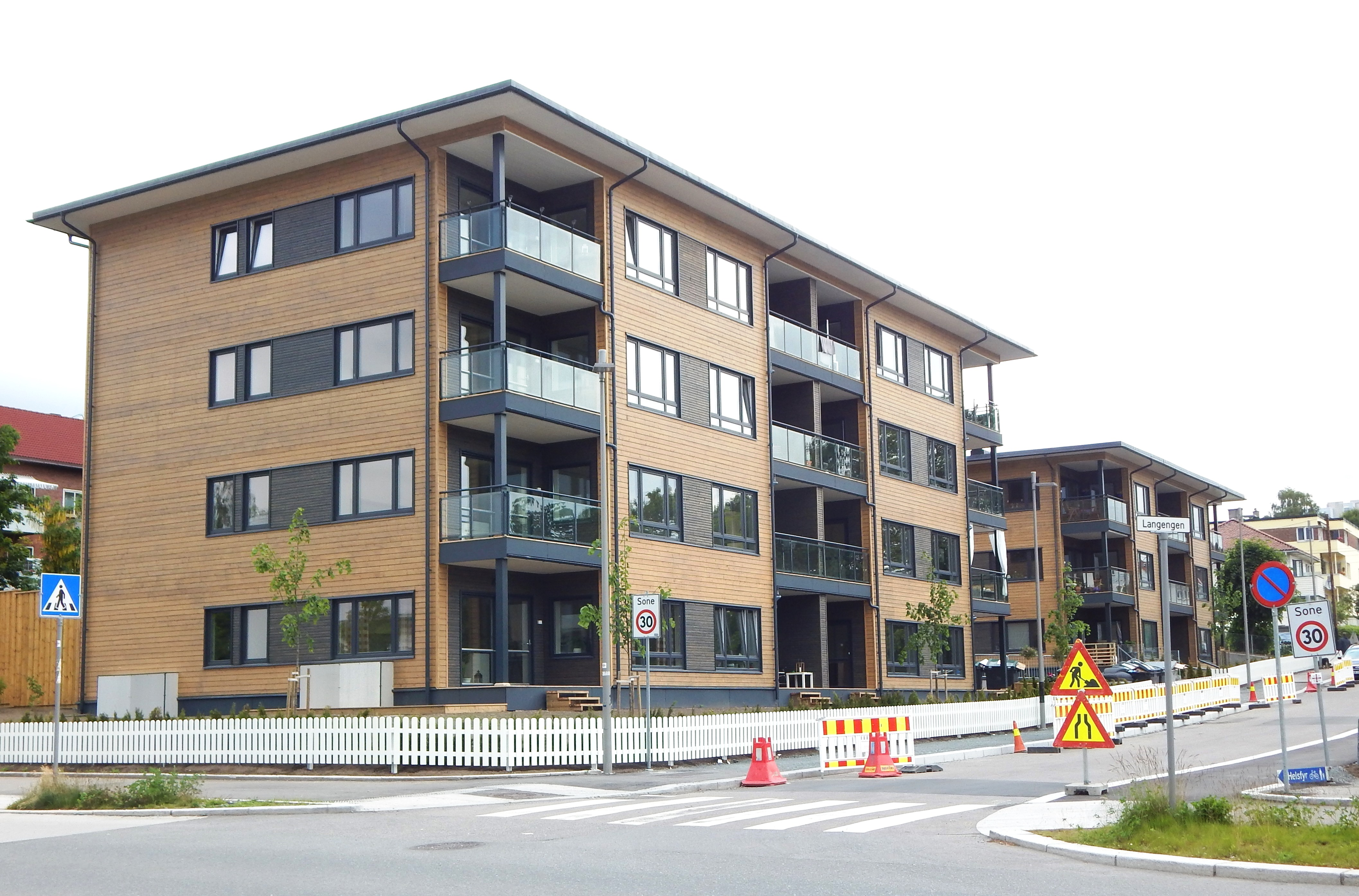 Langengen